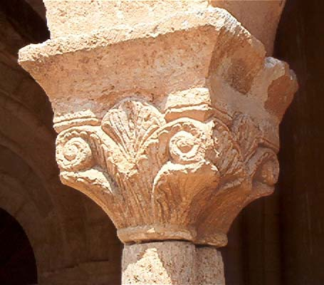 Capitel de San Martín de Aguilera (Soria) Foto realizada por mí; la cedo a Wikipedia.